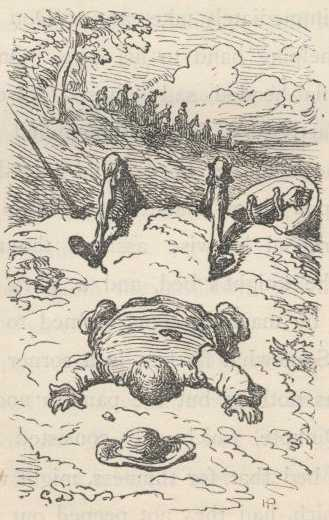 Dom Quixote e Sancho Pança desfalecidos no chão após terem sido sovados pelos donos das éguas.